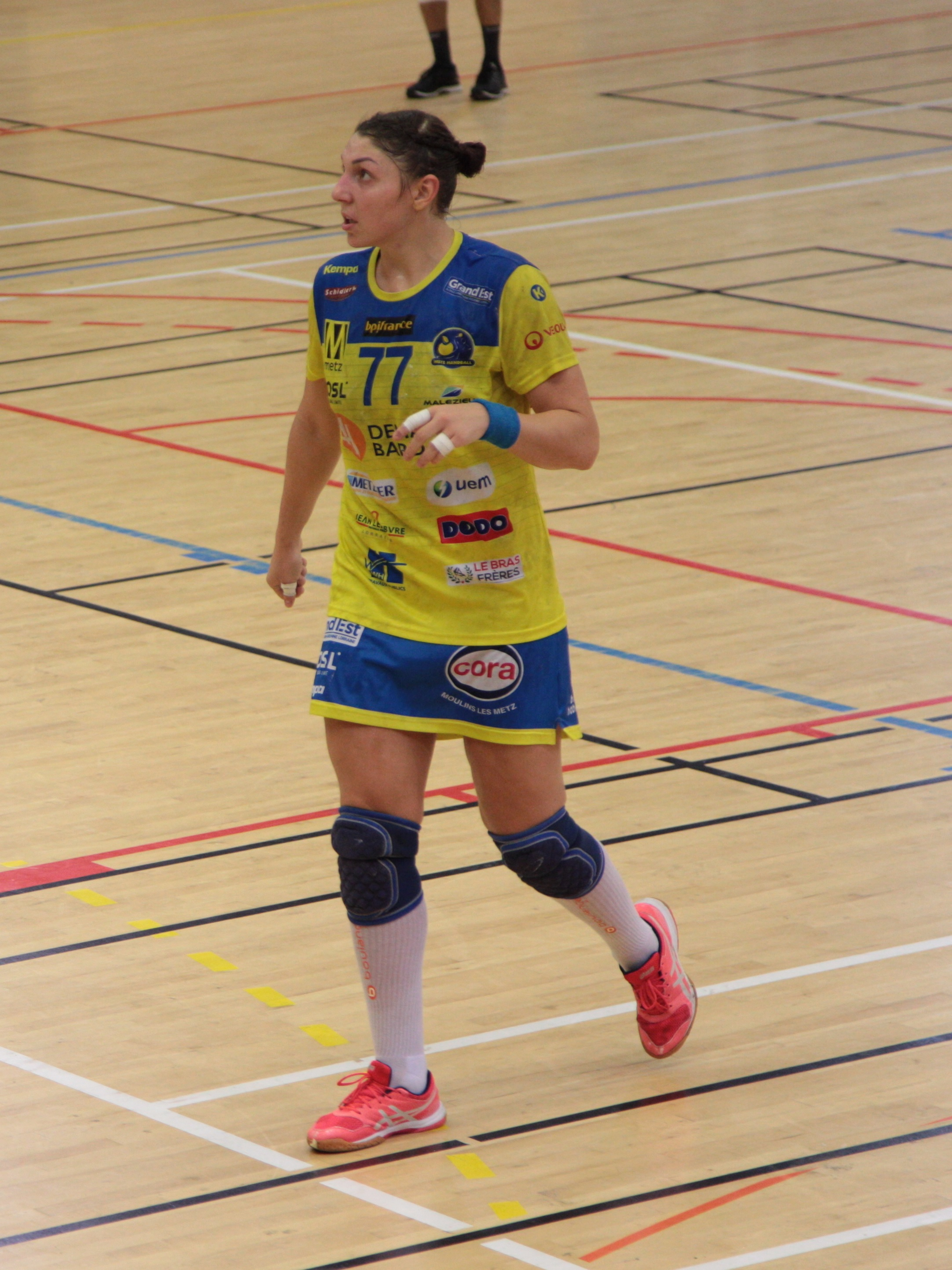 Olga Perederiy, joueuse de l'équipe Metz Handball (maillot 77)